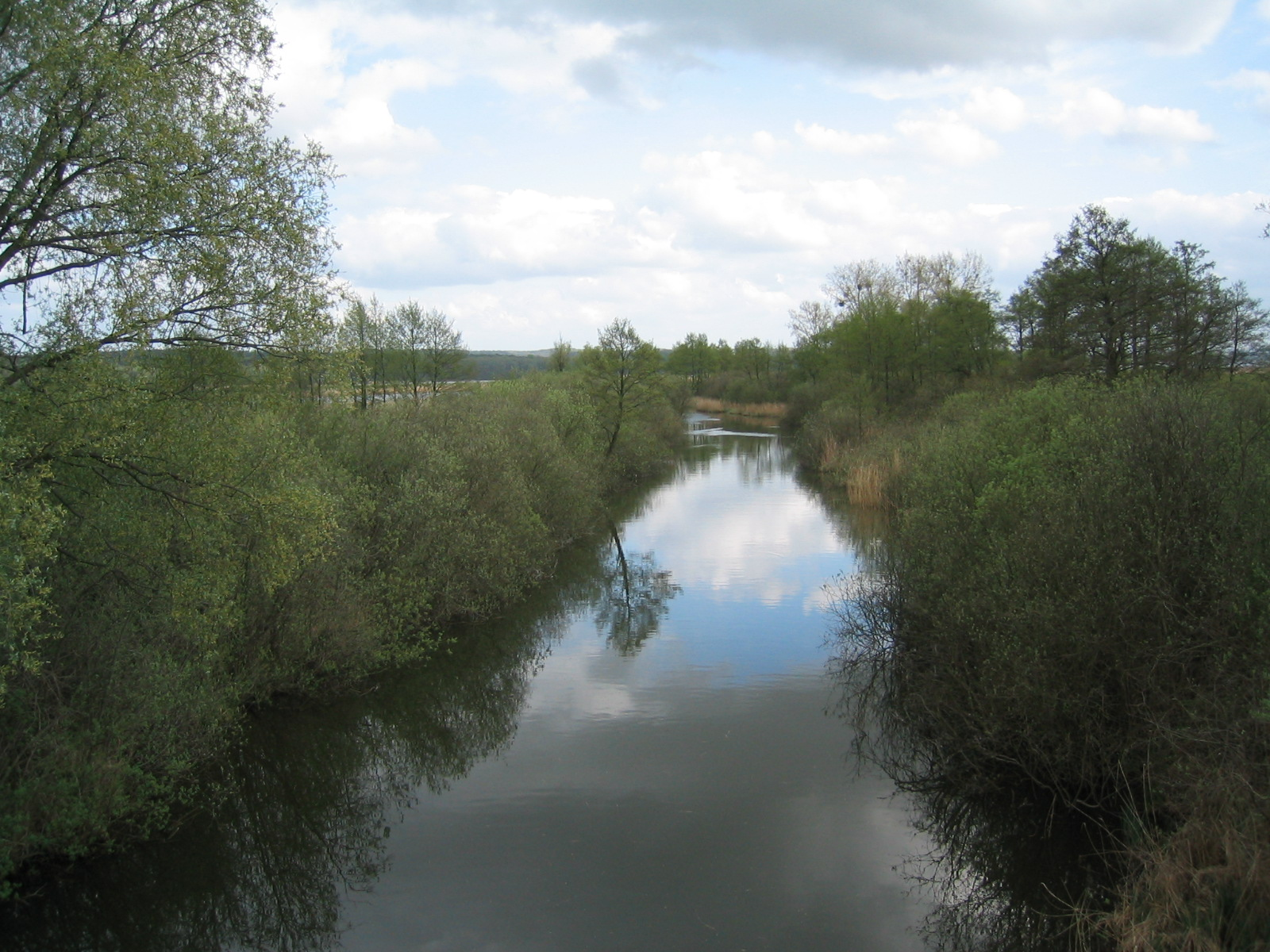 Uckerkanal an der Brücke bei Seehausen (Uckermark), in Blickrichtung nach Süden, entgegen der Fließrichtung zum Unteruckersee, vom Oberuckersee kommend